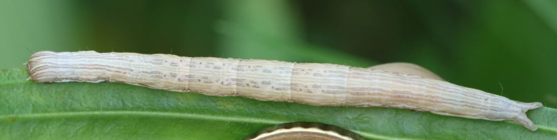 Raupe von Euclidia mi am 5.9.2017 in der Schwetzinger Hardt